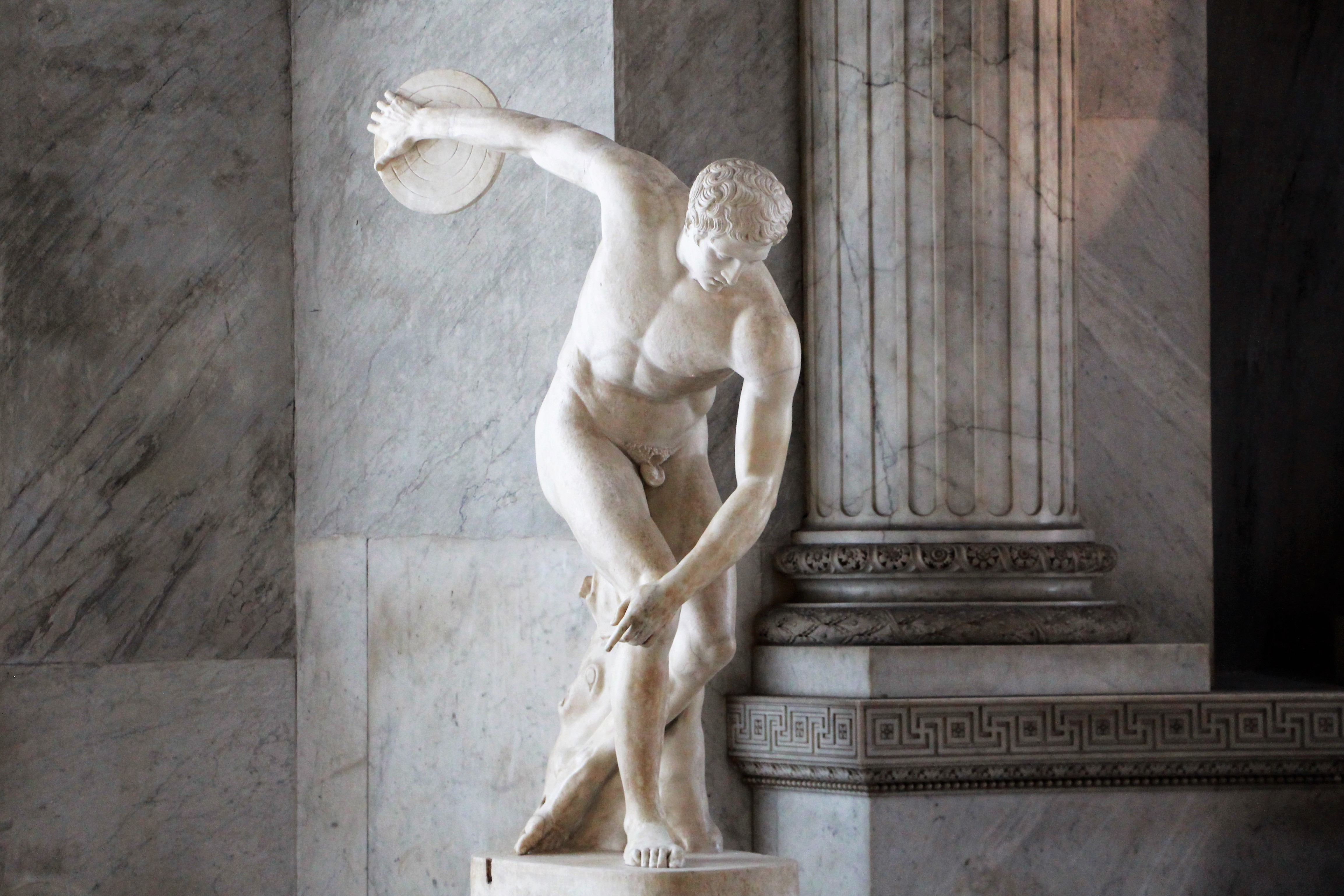 Diskobolos in de Vaticaanse Musea, Rome.